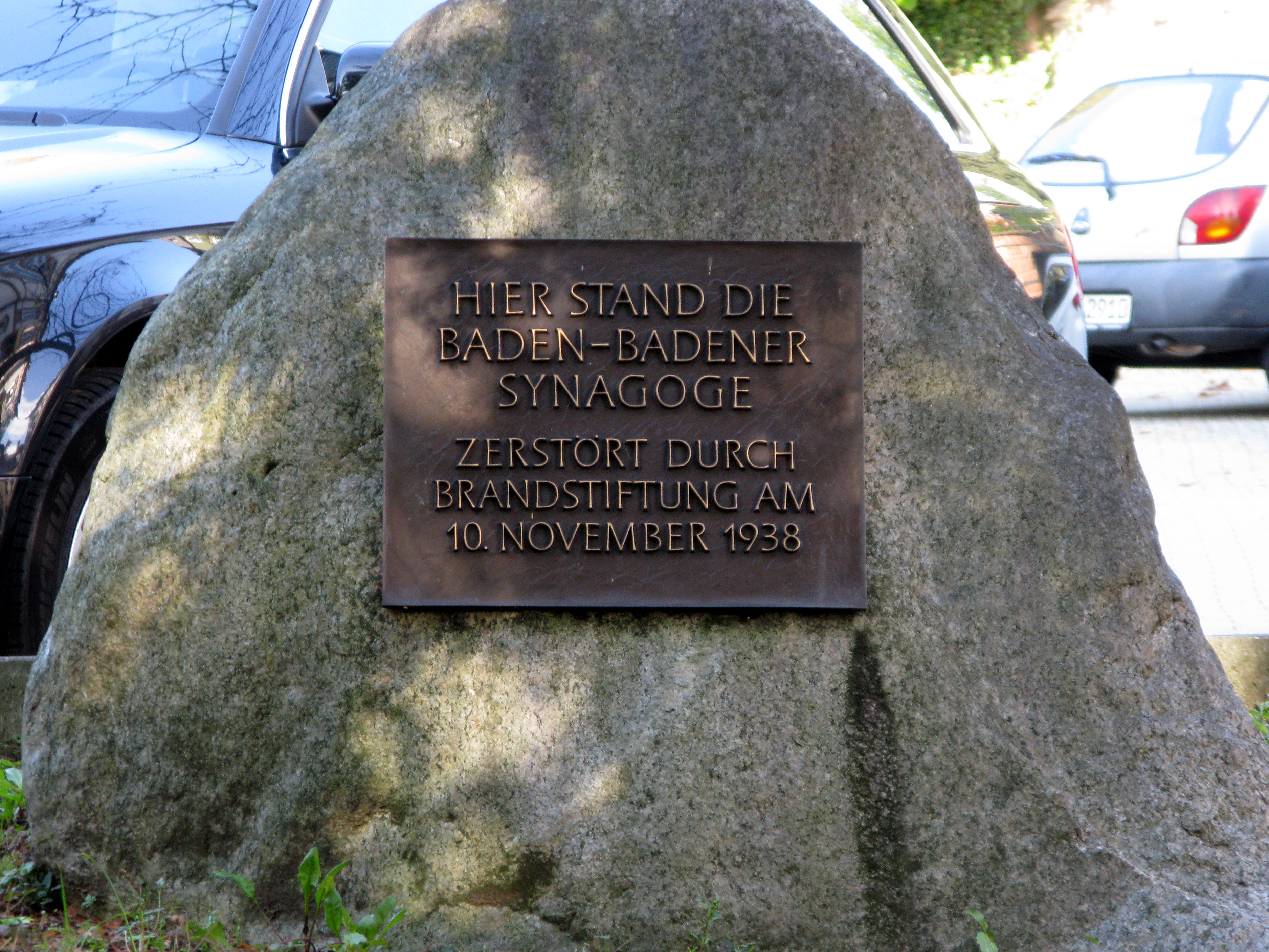 Gedenktafel für die Synagoge in Baden-Baden